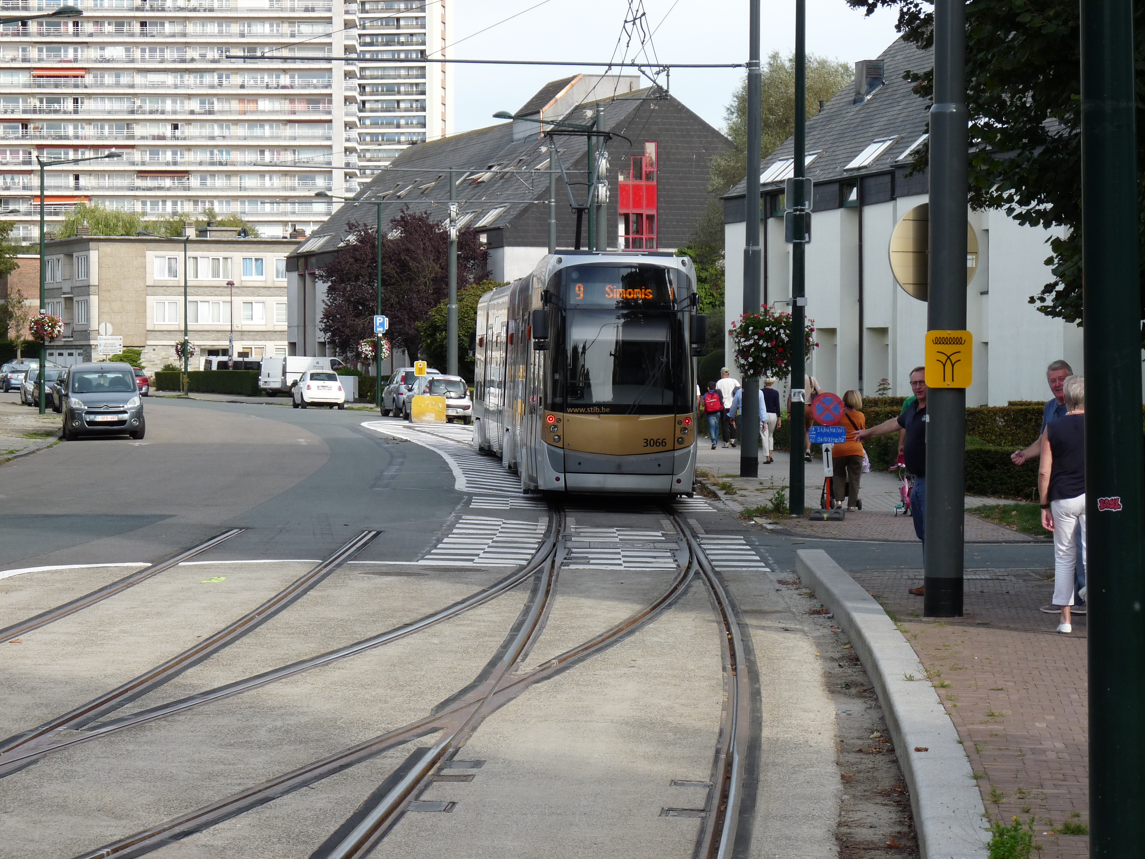 De nieuwe Brusselse tramlijn 9 in de Dikke Beuklaan.